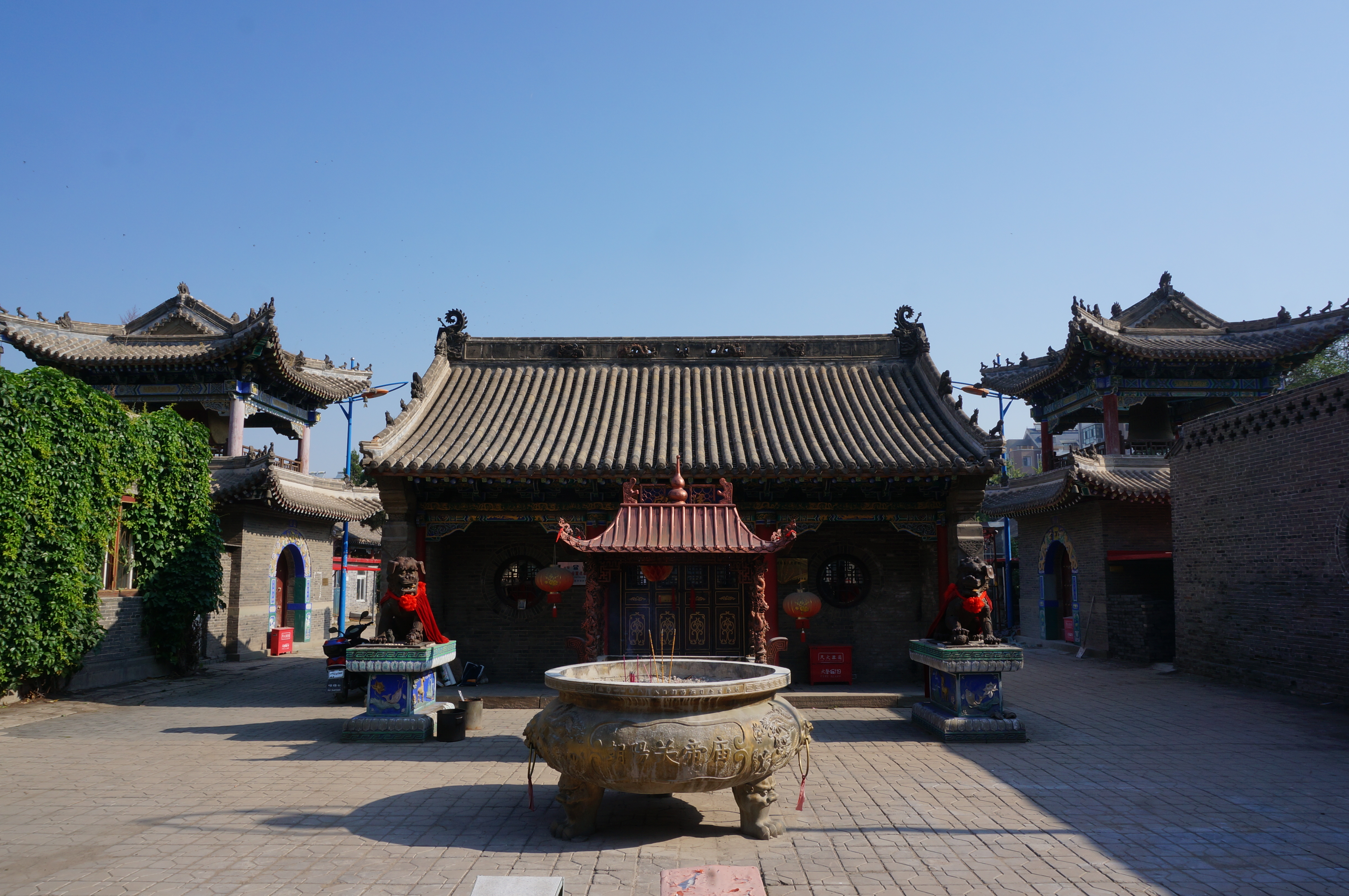 朝阳关帝庙，马殿及钟鼓楼。